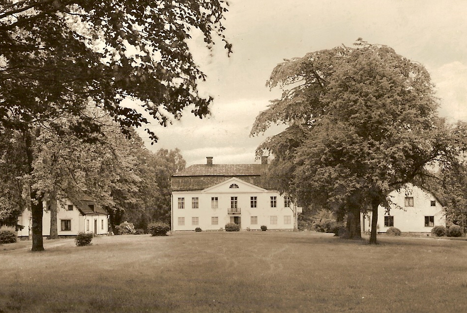 Viks säteri, Södermanland